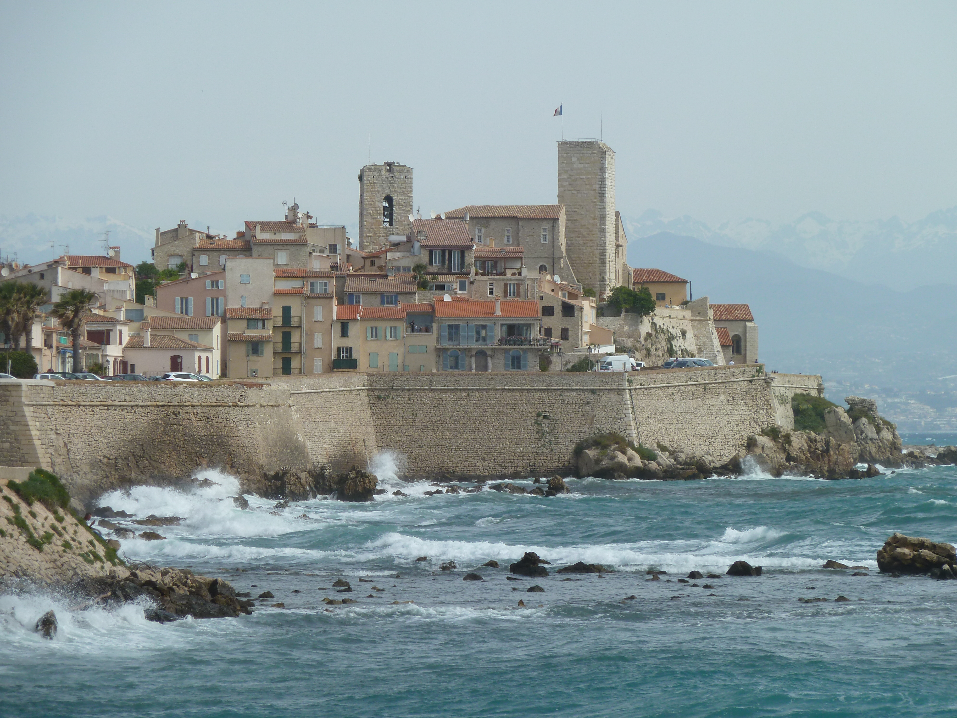 vieille ville d'Antibes